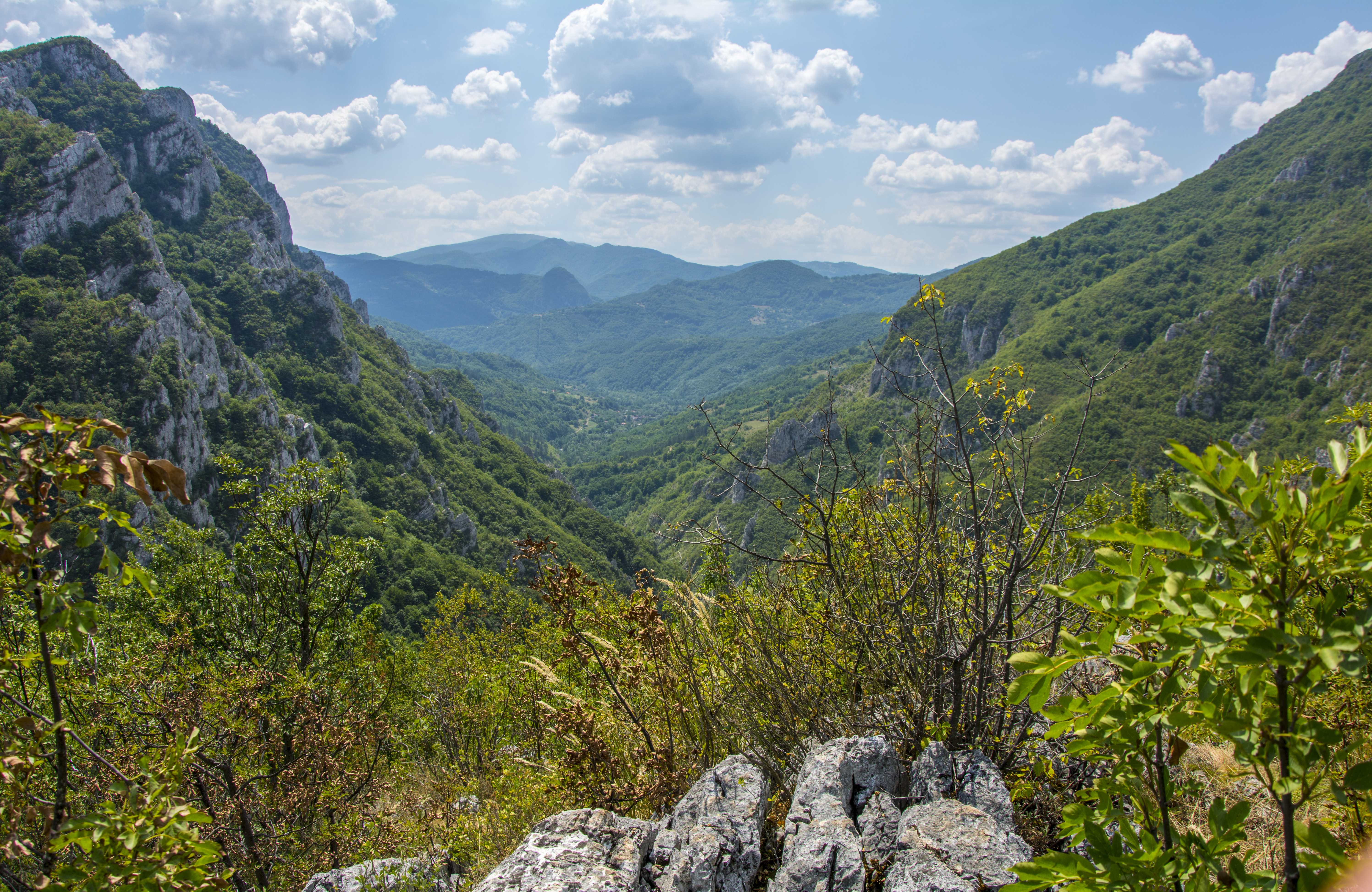 Pogled na Vlaške planine